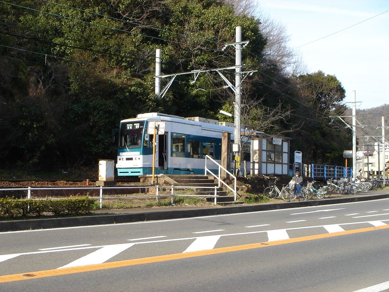 Kotozuka Station (琴塚駅),(廃線となる前の名鉄美濃町線), Gifu, Gifu, Japan (岐阜県岐阜市琴塚1丁目)で撮影